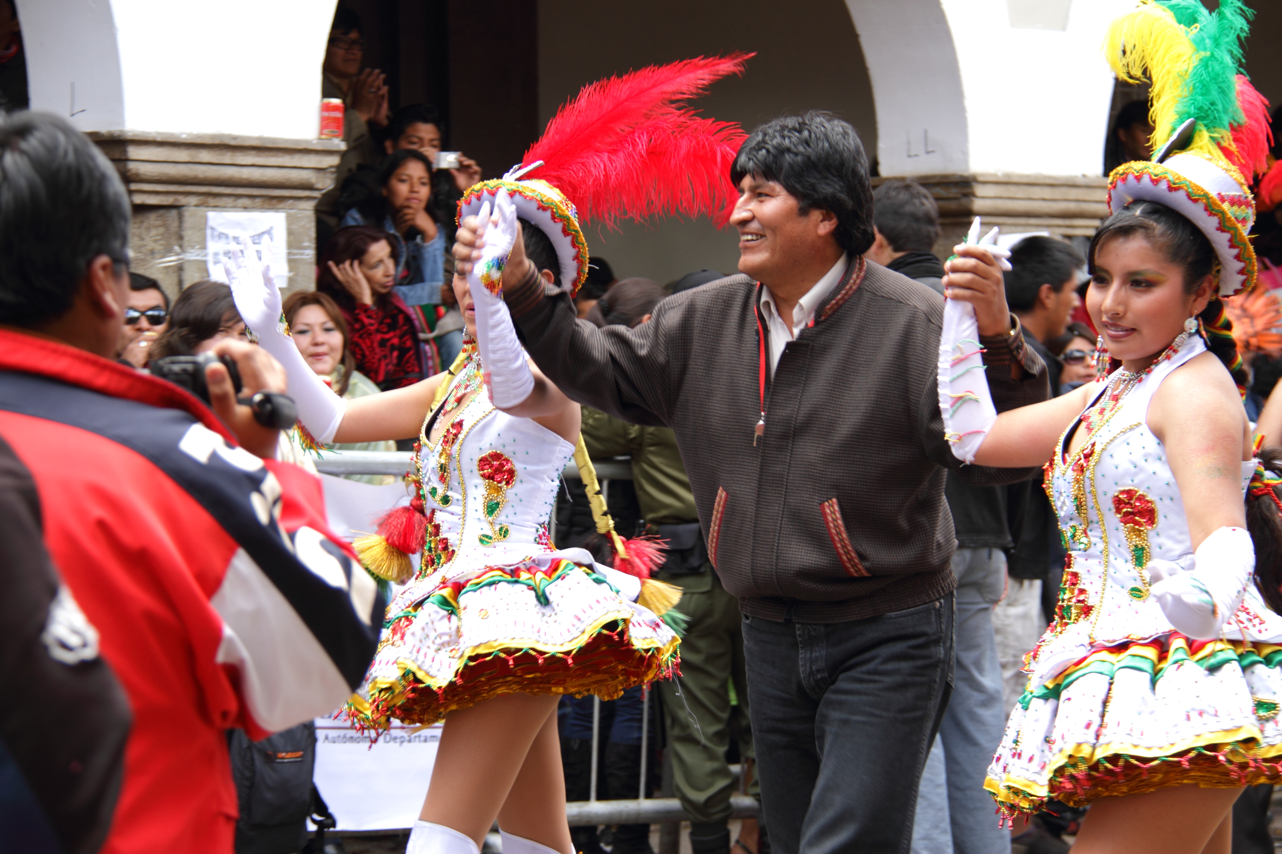 Evo Morales participant au carnaval d'ururo 2012 en Bolivie